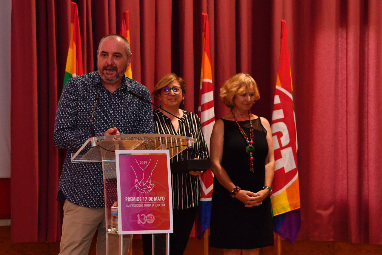 Entrega premios UGT 17 de Mayo a la Fundación Pedro Zerolo. En la imagen: Miguel Ángel Fernández, director ejecutivo de la fundación, Rosa Laviña, secretaria de la fundación y Ana Sanchez de la Coba, secretaria de Igualdad de UGT-MADRID